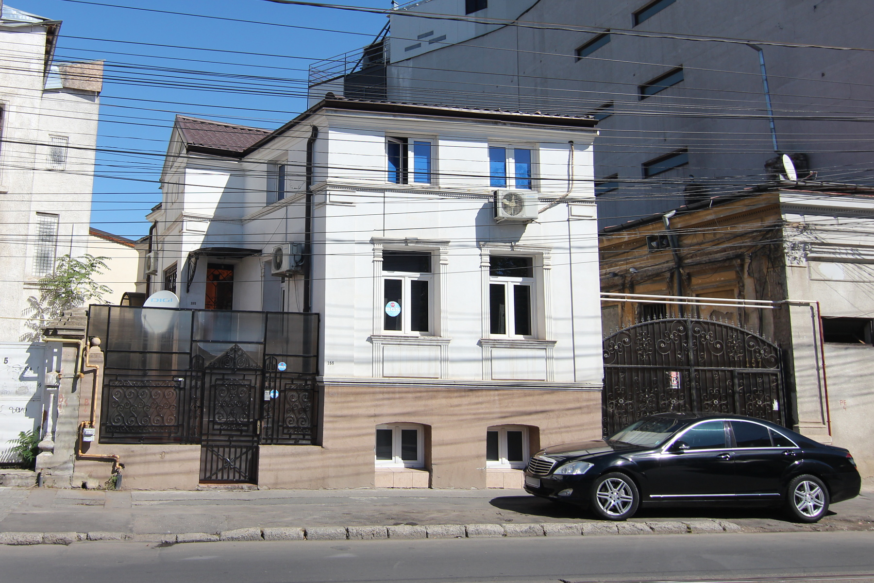 Casă pe Calea Călărașilor